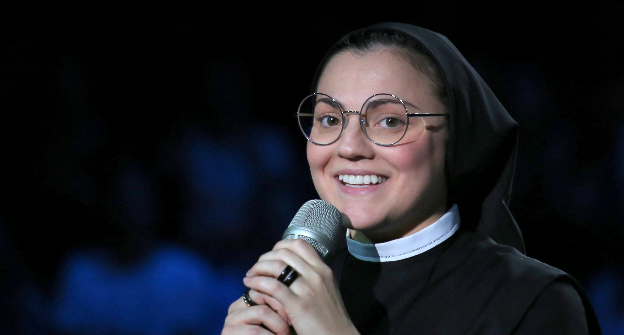 Cristina Scuccia apáca